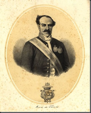 Gravura do Conde de Farrobo